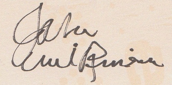 Autogramm des Gitarristen John Wilkinson